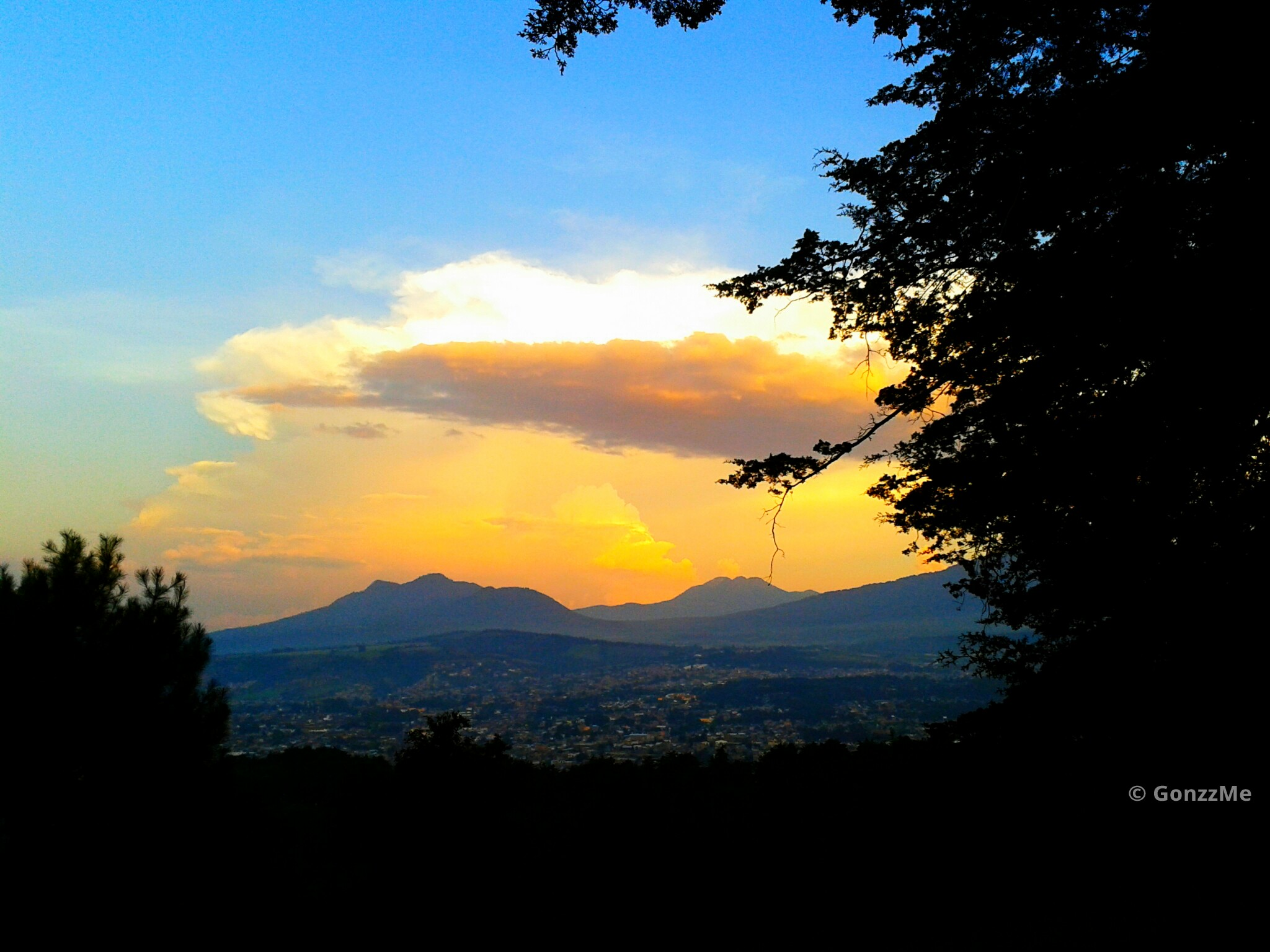 Pátzcuaro, Michoacán, México. Vista desde el mirador el Estribo